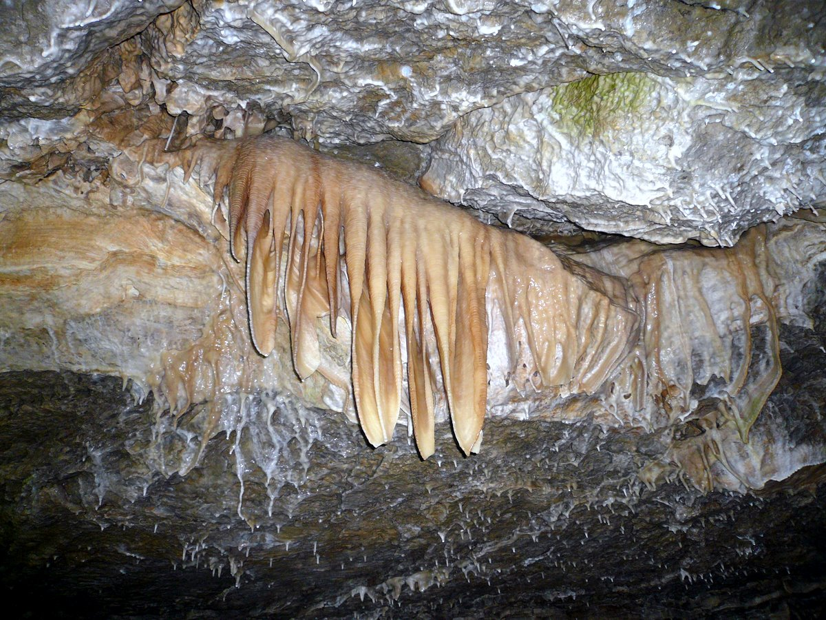 Sinterfahnen in der Eberstadter Tropfsteinhöhle